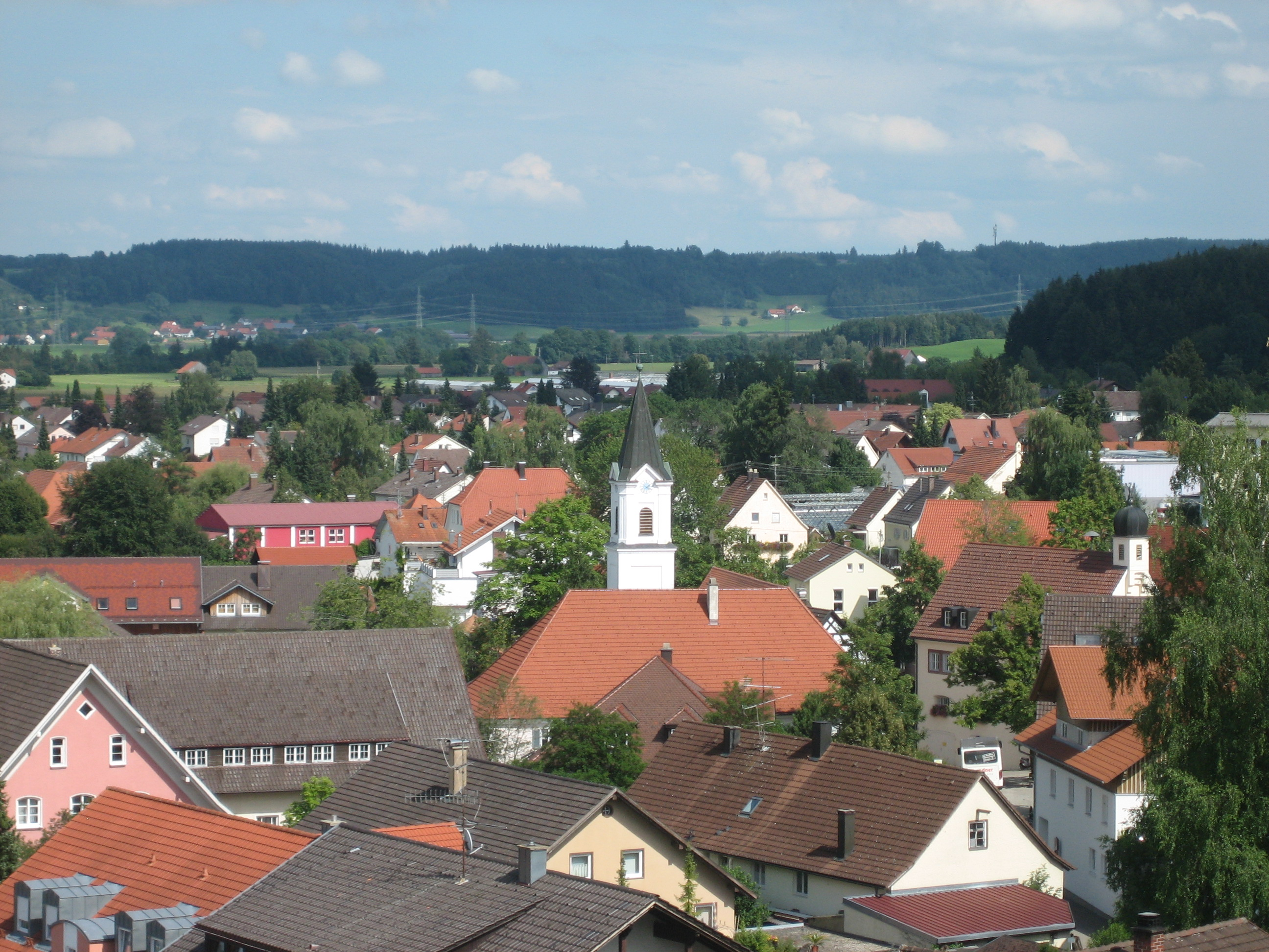 Evangelisch-Reformierte Kirche in Bad Grönenbach, Landkreis Unterallgäu, Bayern